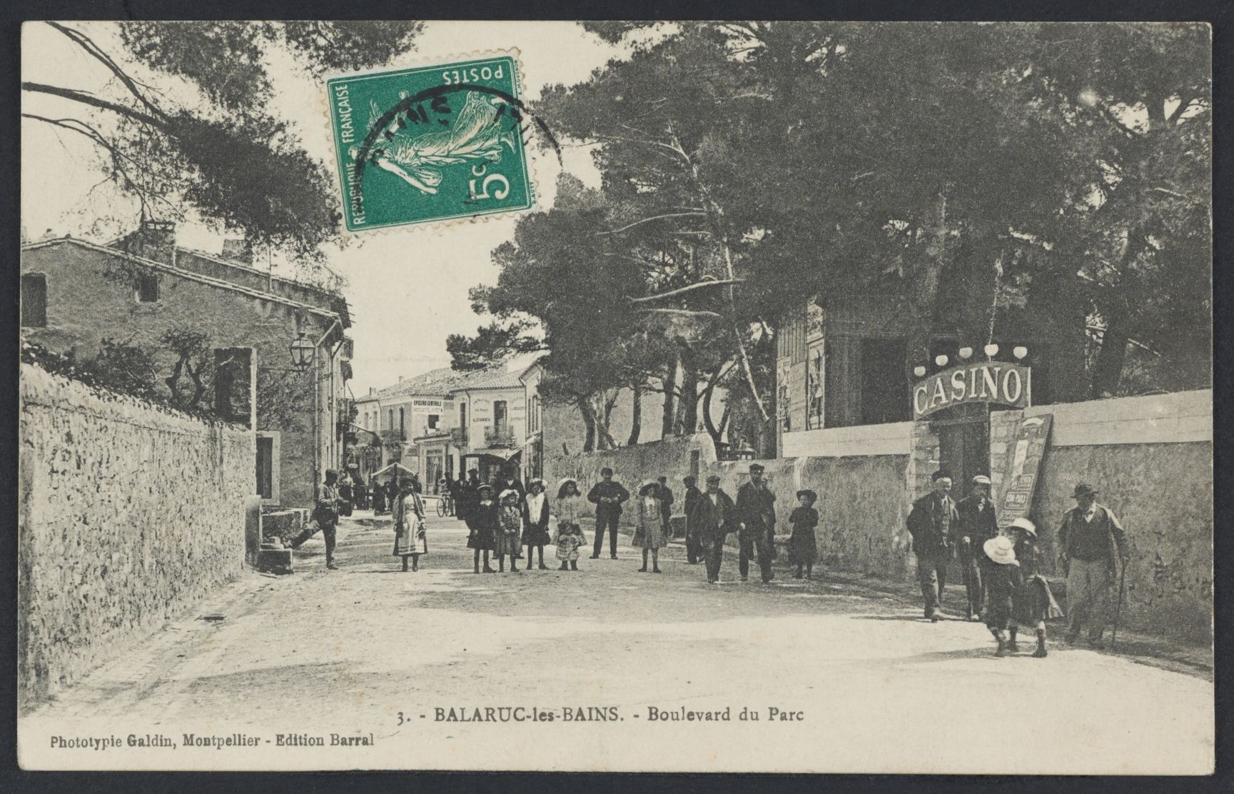 Balaruc-les-Bains. - Boulevard du Parc : carte postale, 1ère moitié du XXe siècle